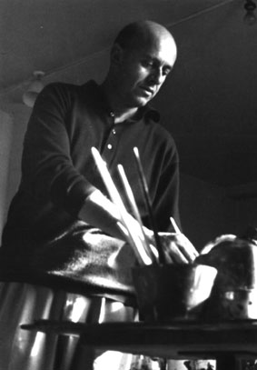 Mario Comensoli Foto Sonya Robbiani